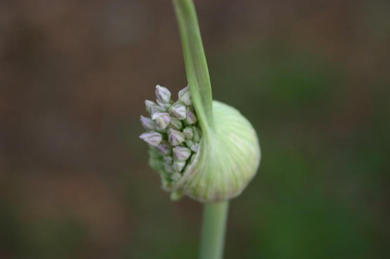 Elephant Garlic (Allium ampeloprasum)